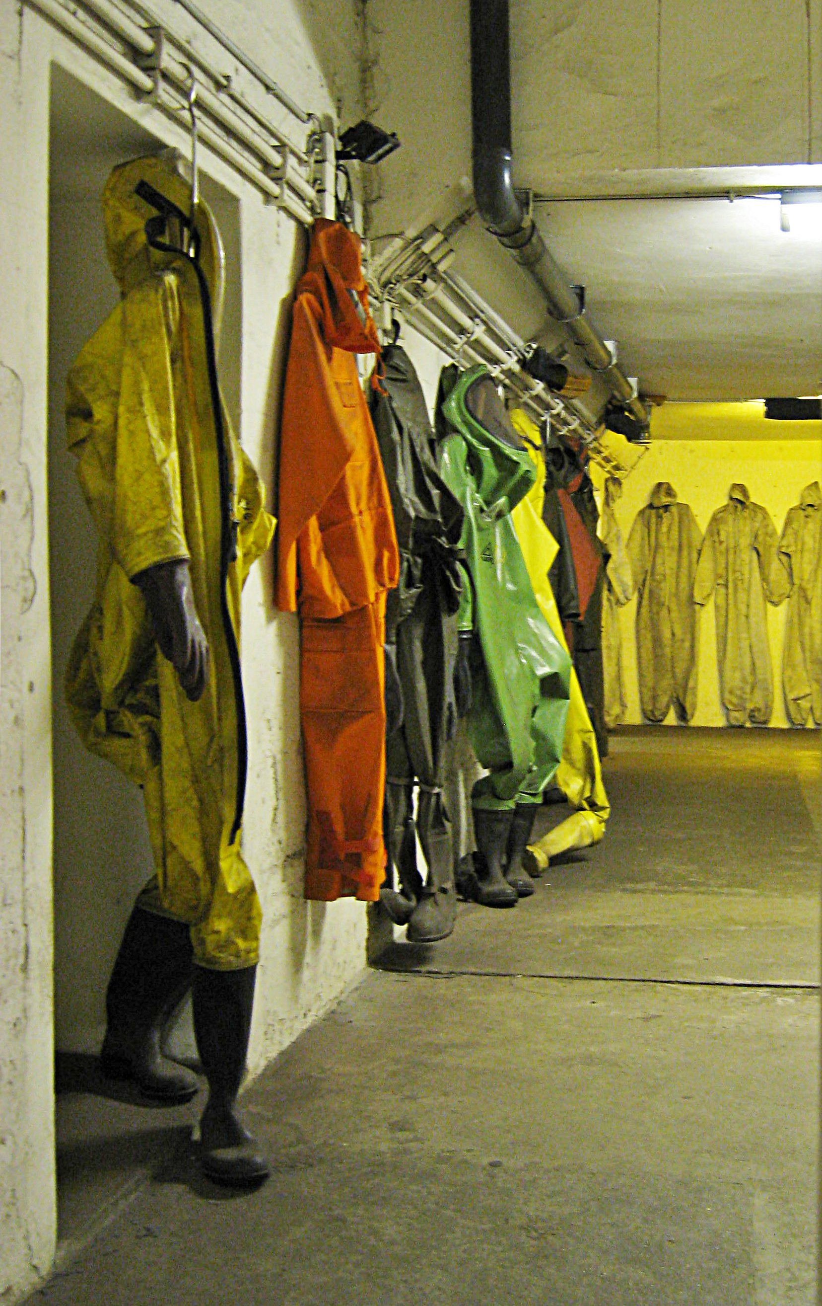 Berliner Unterwelten